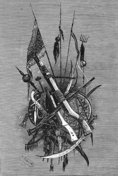 Оружие и доспехи в Средней Азии. Иллюстрация из журнала "Нива" № 15, с. 233-235